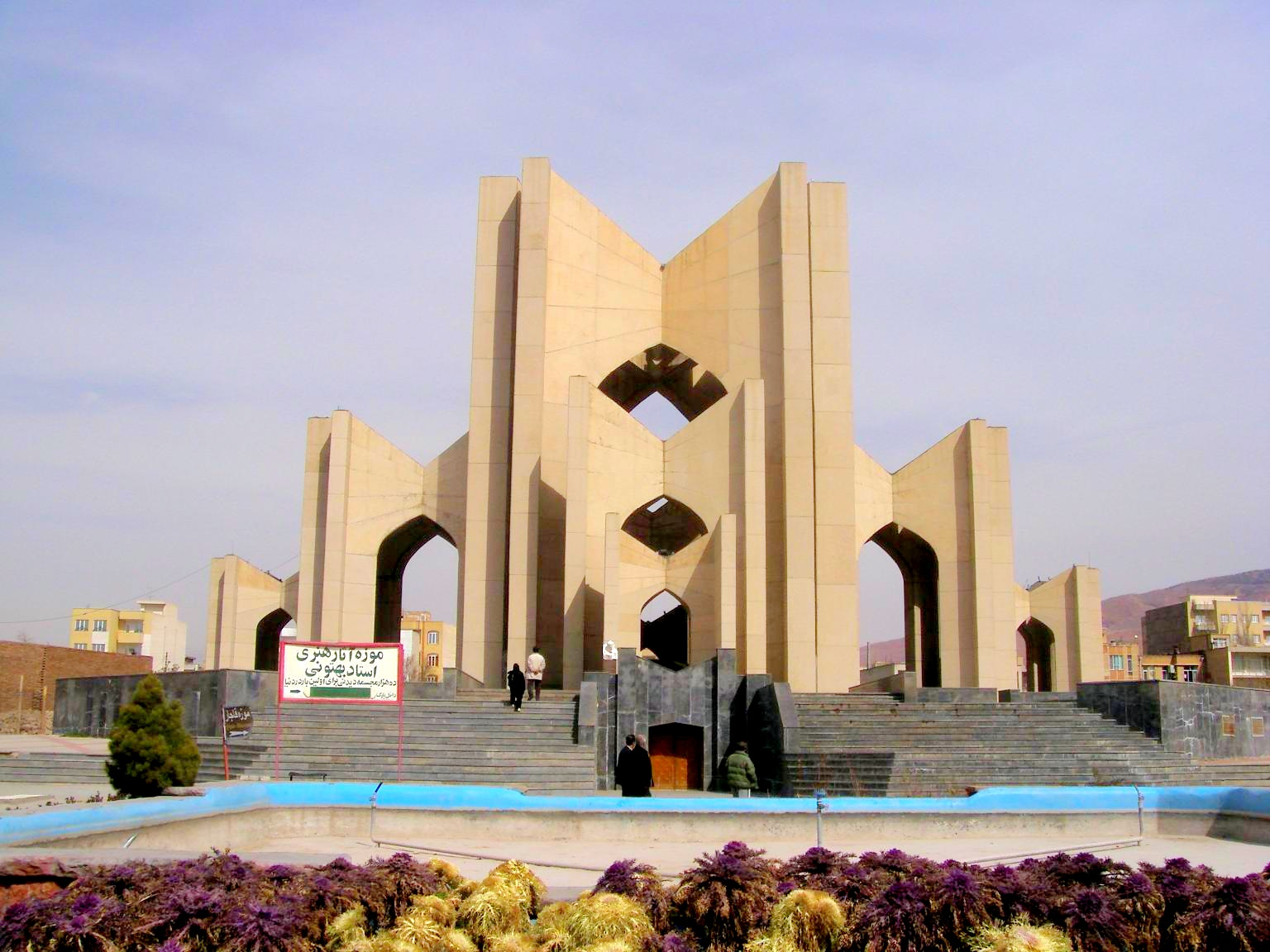 Poets Mausoleum, Tabriz, Iran (مقبرة‌الشعرا، تبریز، ایران)